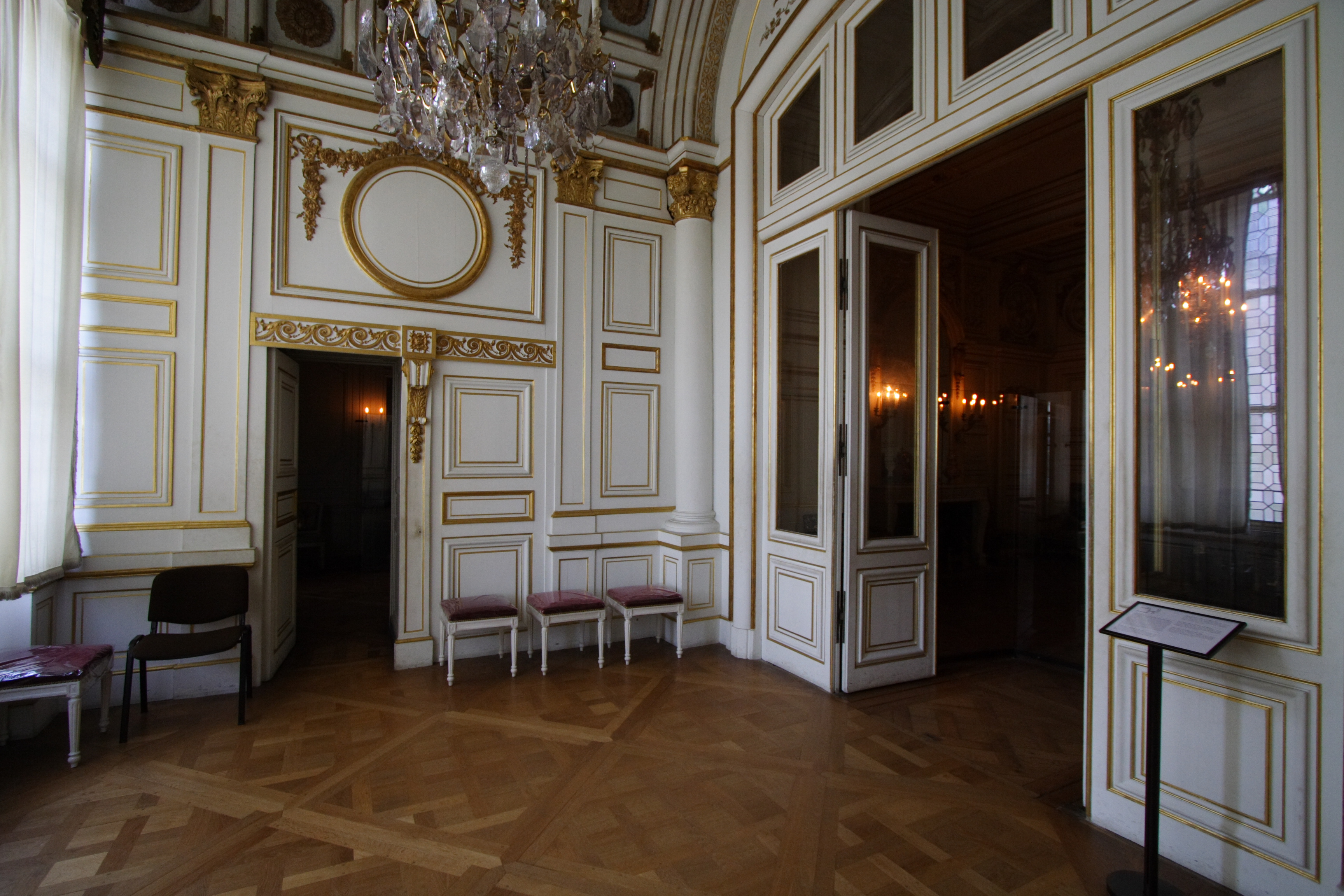 Loggia der Appartements Madame de Maintenons im Schloss Fontainebleau